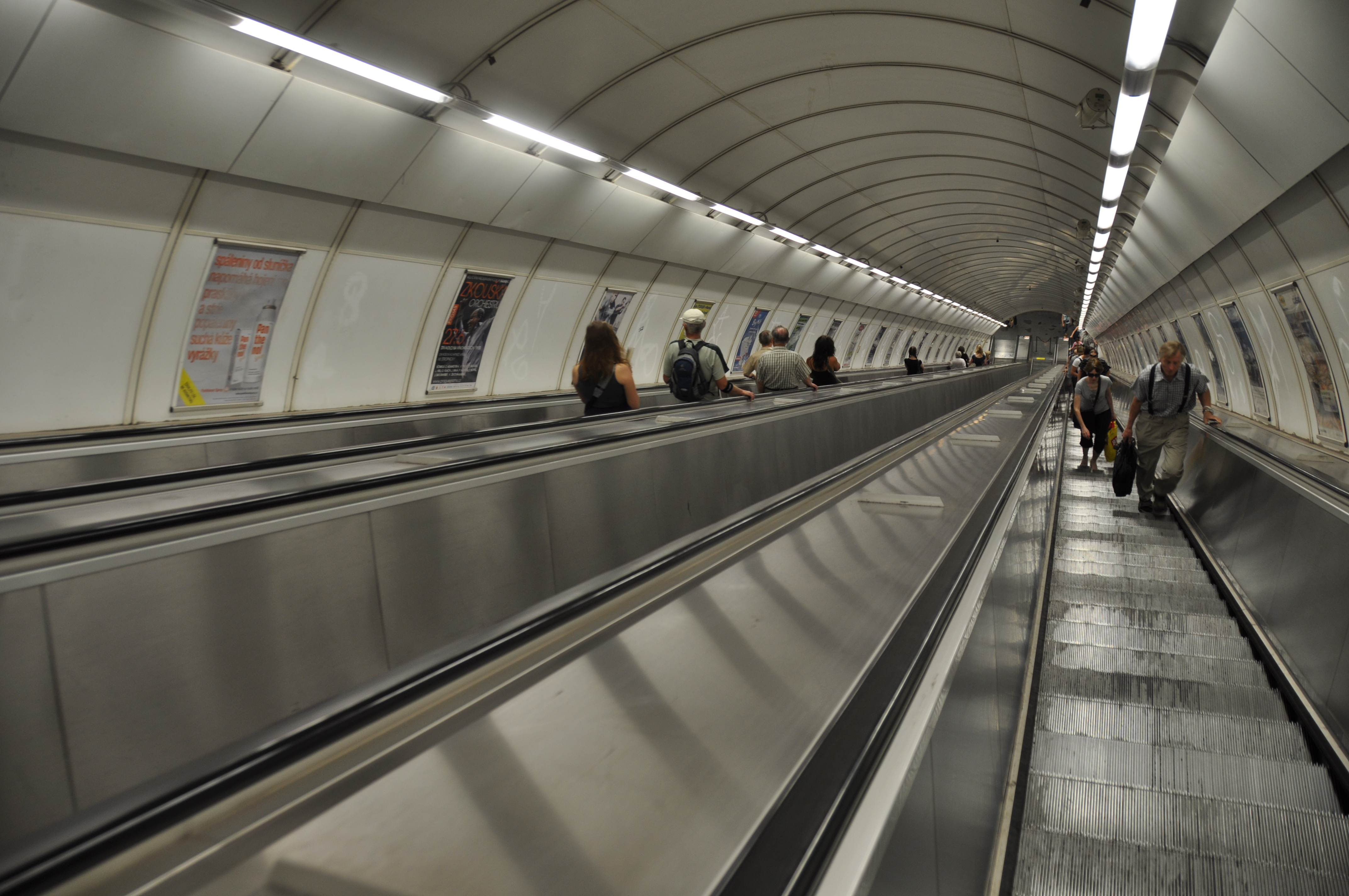 Metro Praha